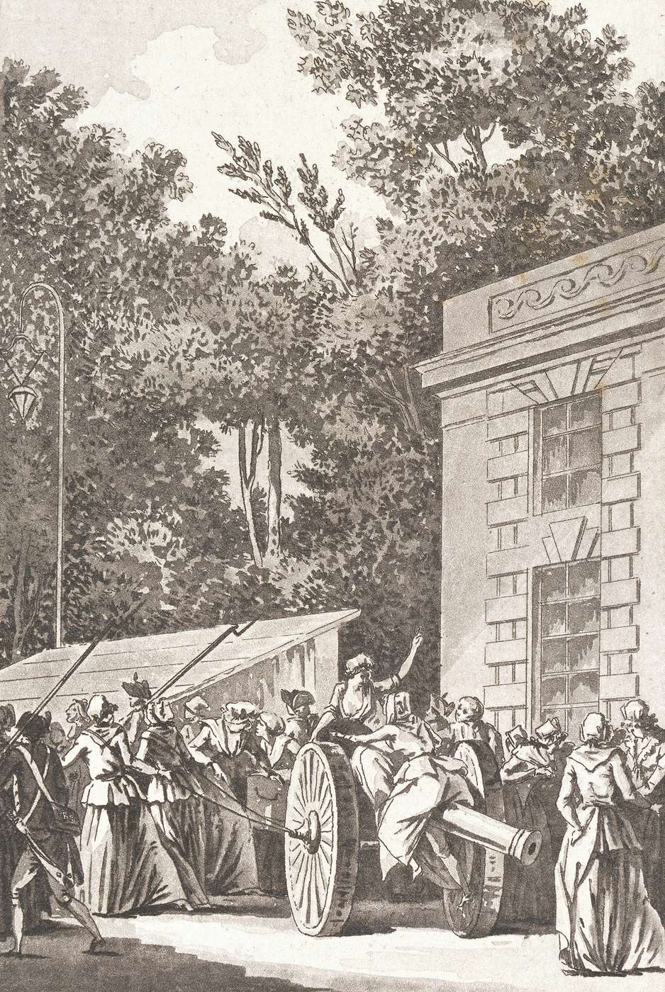 Le Départ des Dames de la Halle et des Femmes de Paris pour Versailles, 5 octobre 1789, Gravures historiques des principaux événemens depuis l’ouverture des Etats-Généraux de 1789.